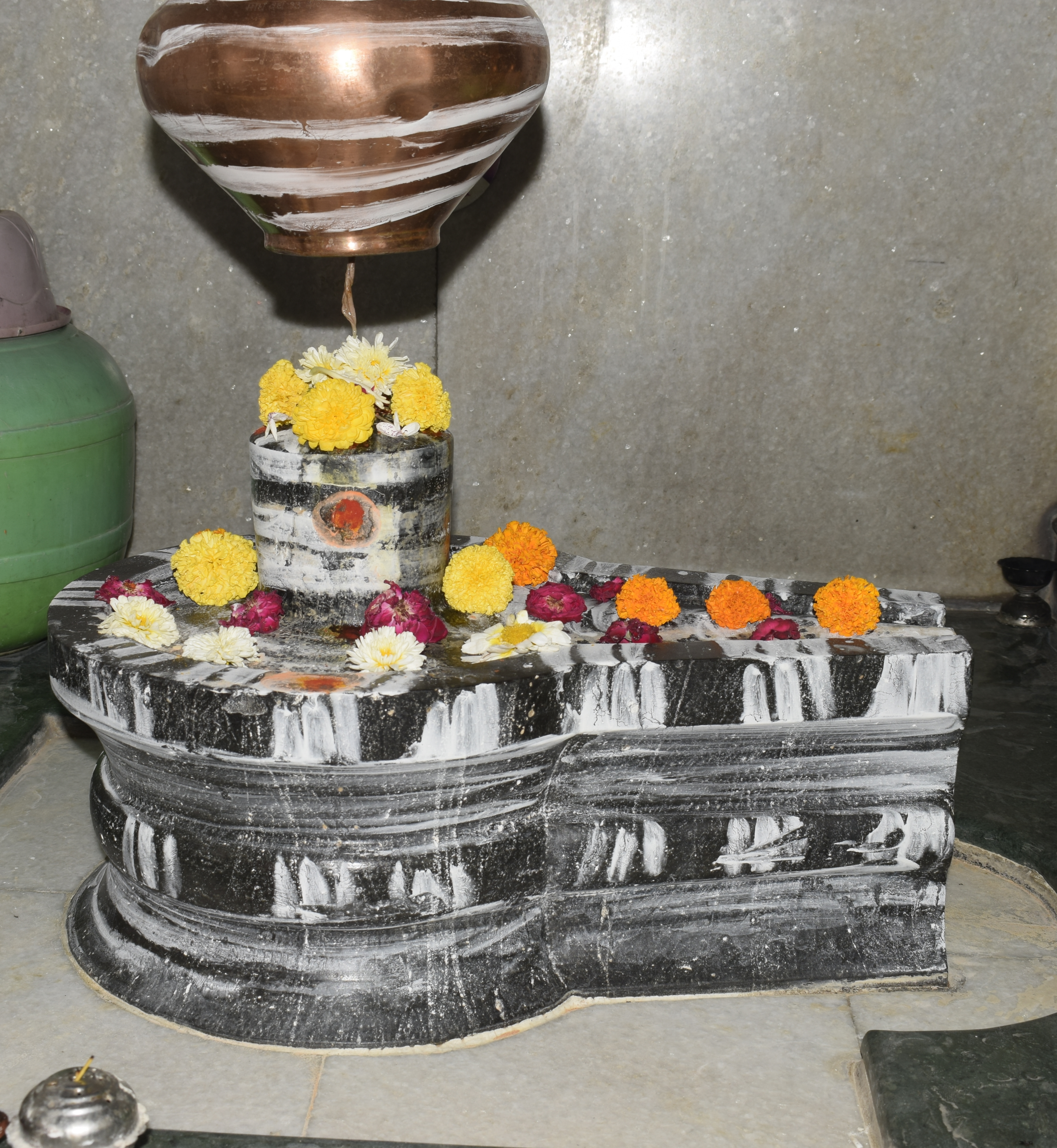 श्री बंडेश्वर लिंग